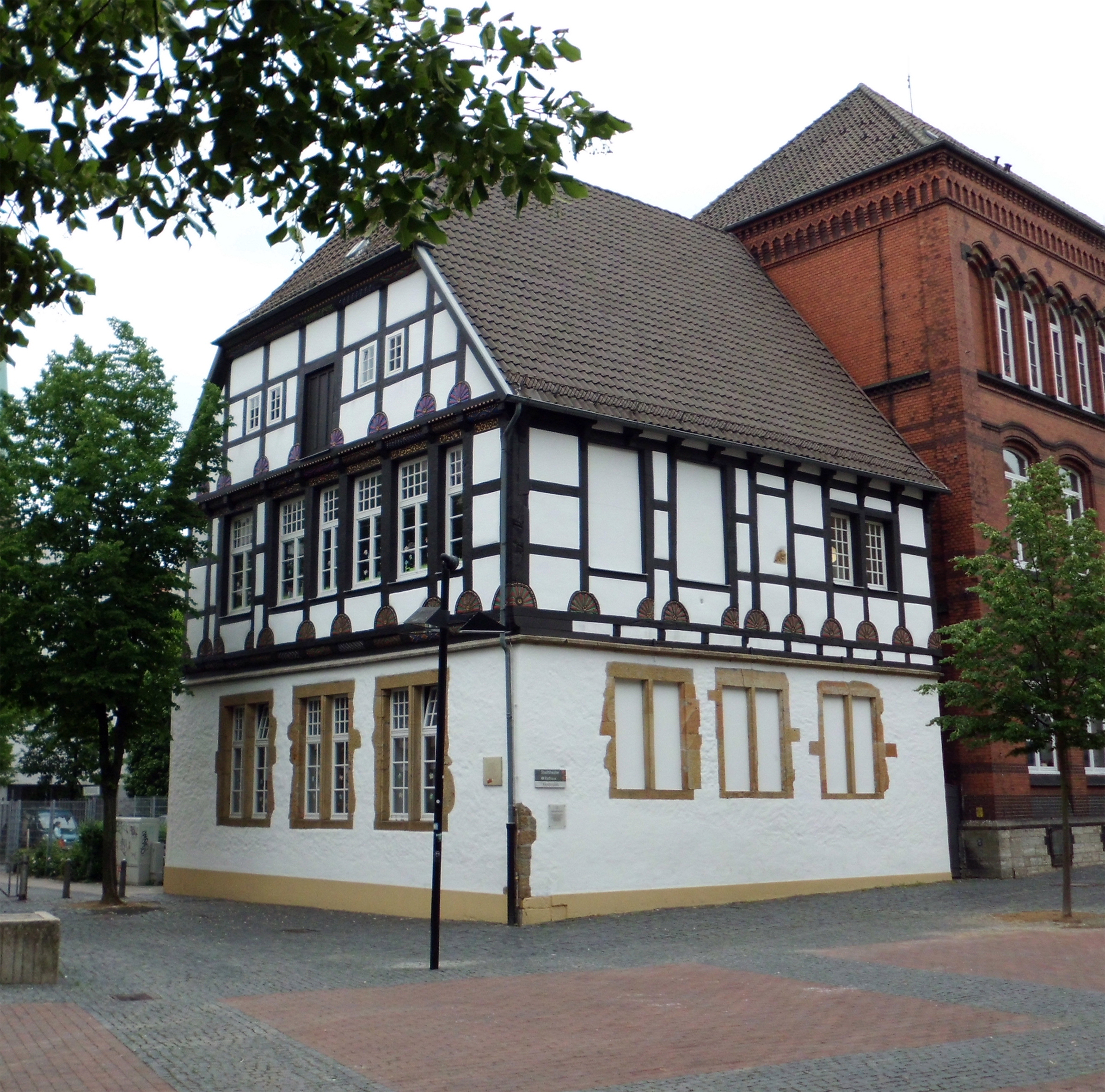 Bielefeld, ehemaliger Adelshof von Schmising (Woermannhaus) am Klosterplatz This is a photograph of an architectural monument.